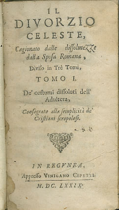 «Il divorzio celeste cagionato dalle dissolutezze della Sposa romana», di Ferrante Pallavicino, 1679 (prima edizione 1643)